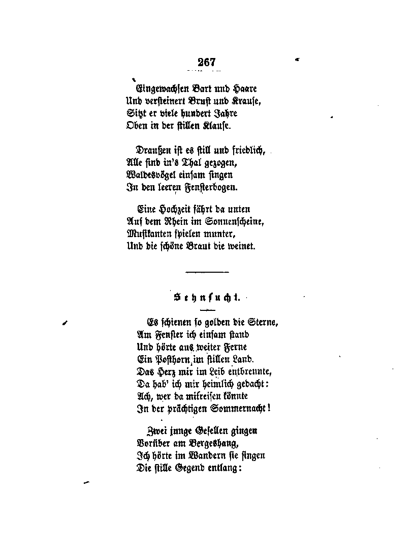 Sehnsucht aus: Joseph Freiherrn von Eichendorff‘s sämmtliche Werke. 2. Auflage